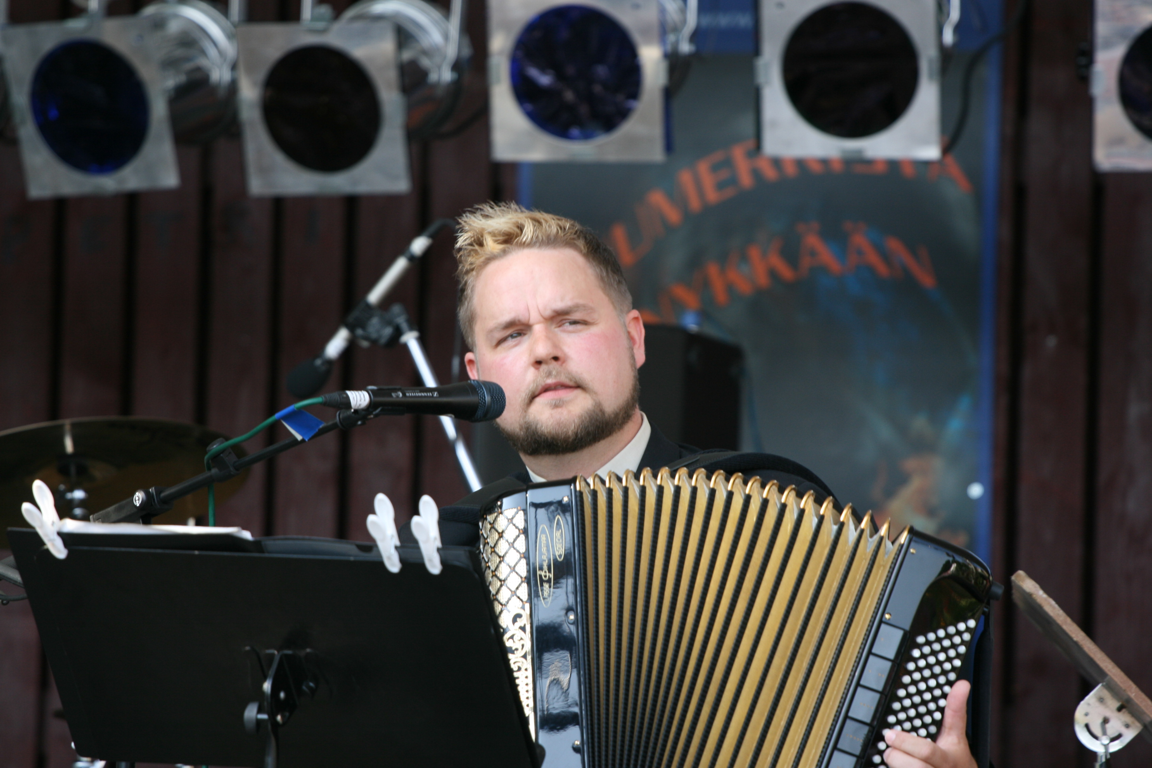 Pekka Laakso finnish player